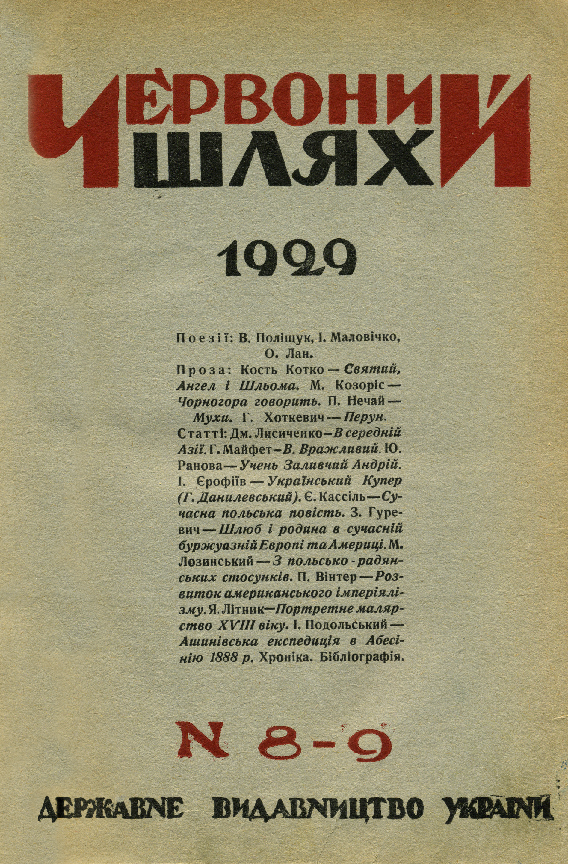 Обкладинка журналу «Червоний шлях» № 8–9 (77–78) за 1929 рік